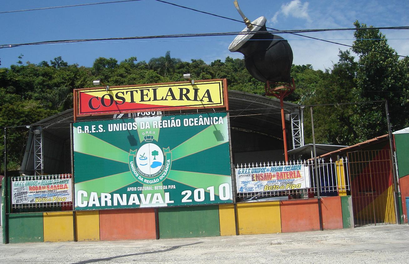 sede da escola de samba GRES Unidos da Região Oceânica.